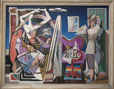 Karl Lorenz Kunz - Ölgemälde: Die drei Grazien